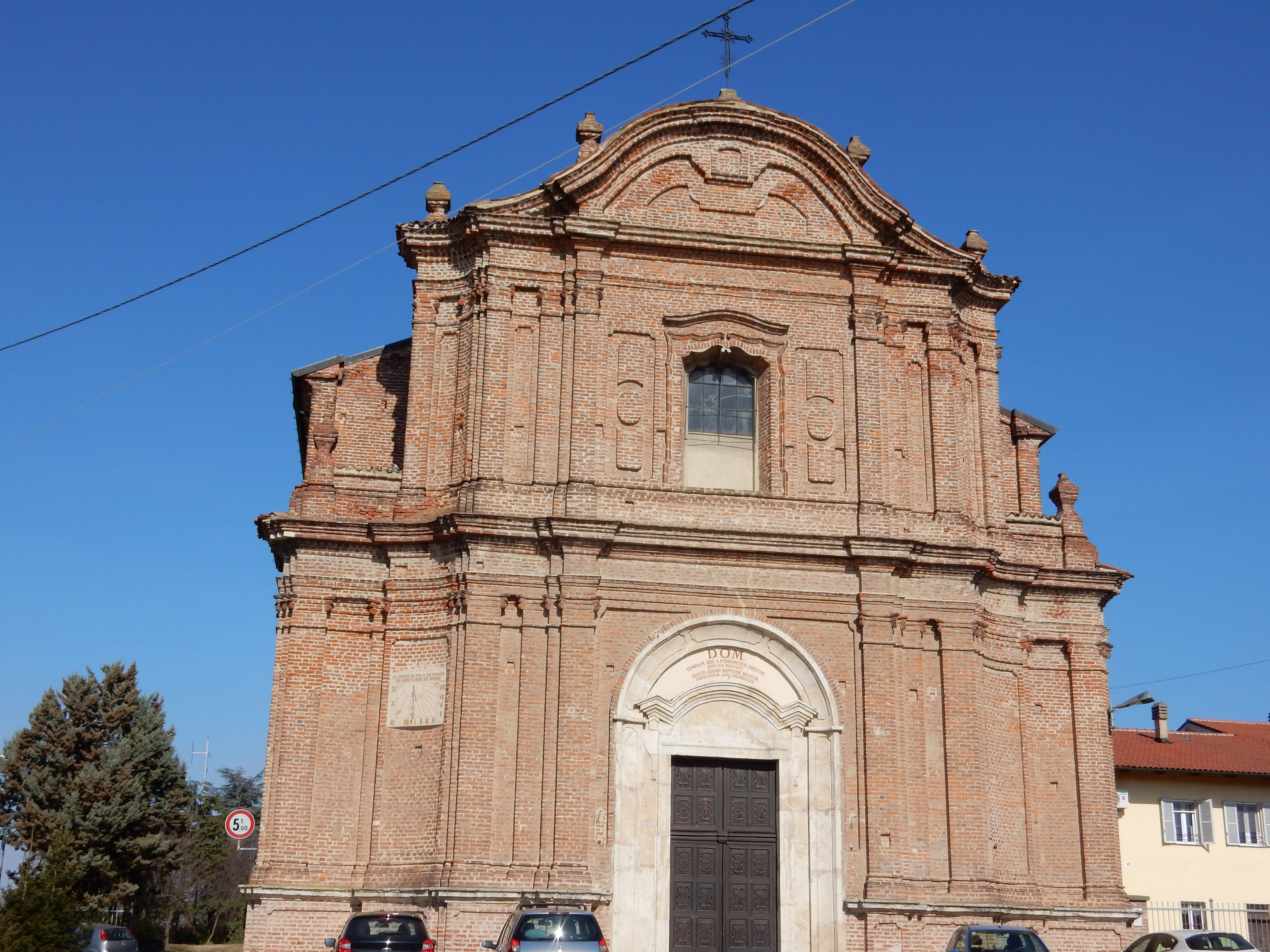 Panorama facciata Chiesa